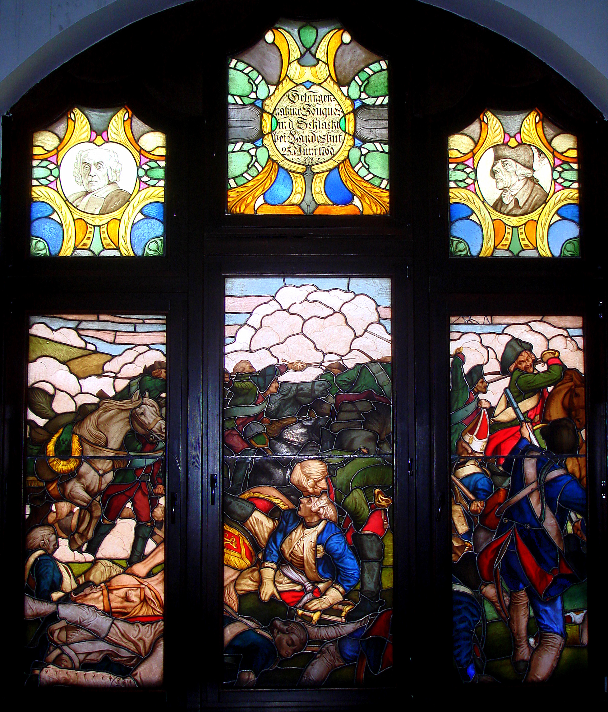 Epizod wojen śląskich (1740-1763). Gen. Fougues wzięty do niewoli w czasie bitwy pod Landeshut 23 czerwca 1760 r. - "Pruskie Termopile".